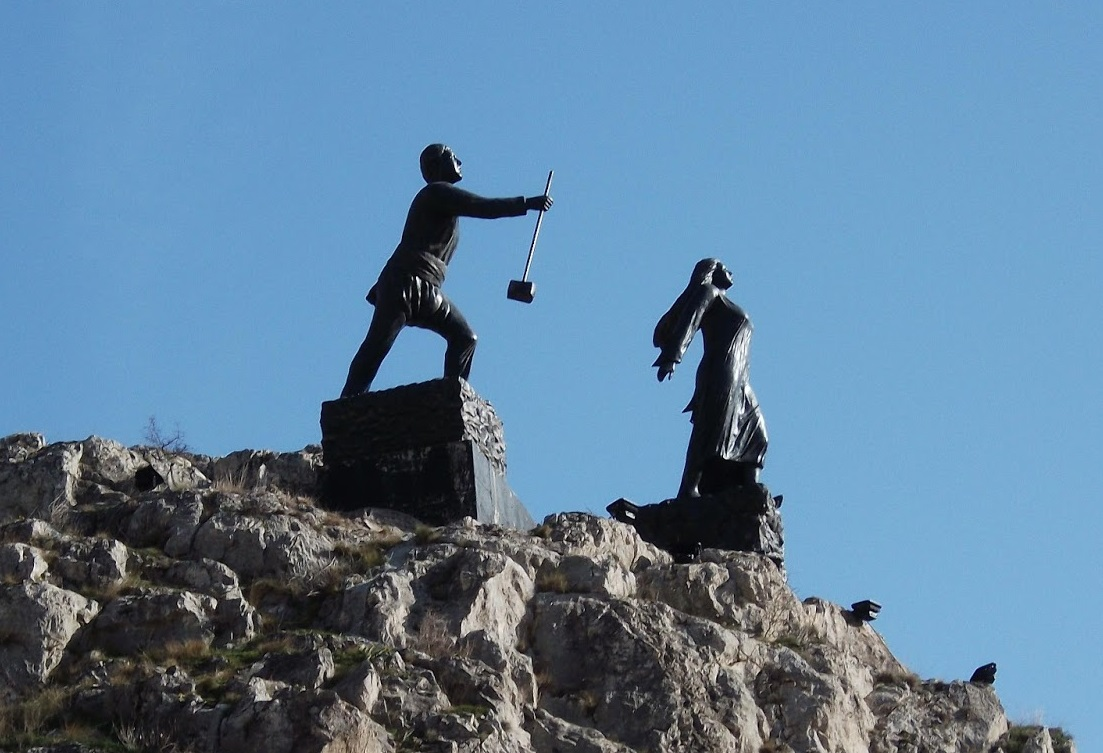 Amasya-Tokat istikameti üzerinde Amasya şehir merkezi girişi üzerinde Ferhat'ın Şirin'in aşkı için kazdığına inanılan kuyuların üzerinde temsili Ferhat ile Şirin mozeleleri.